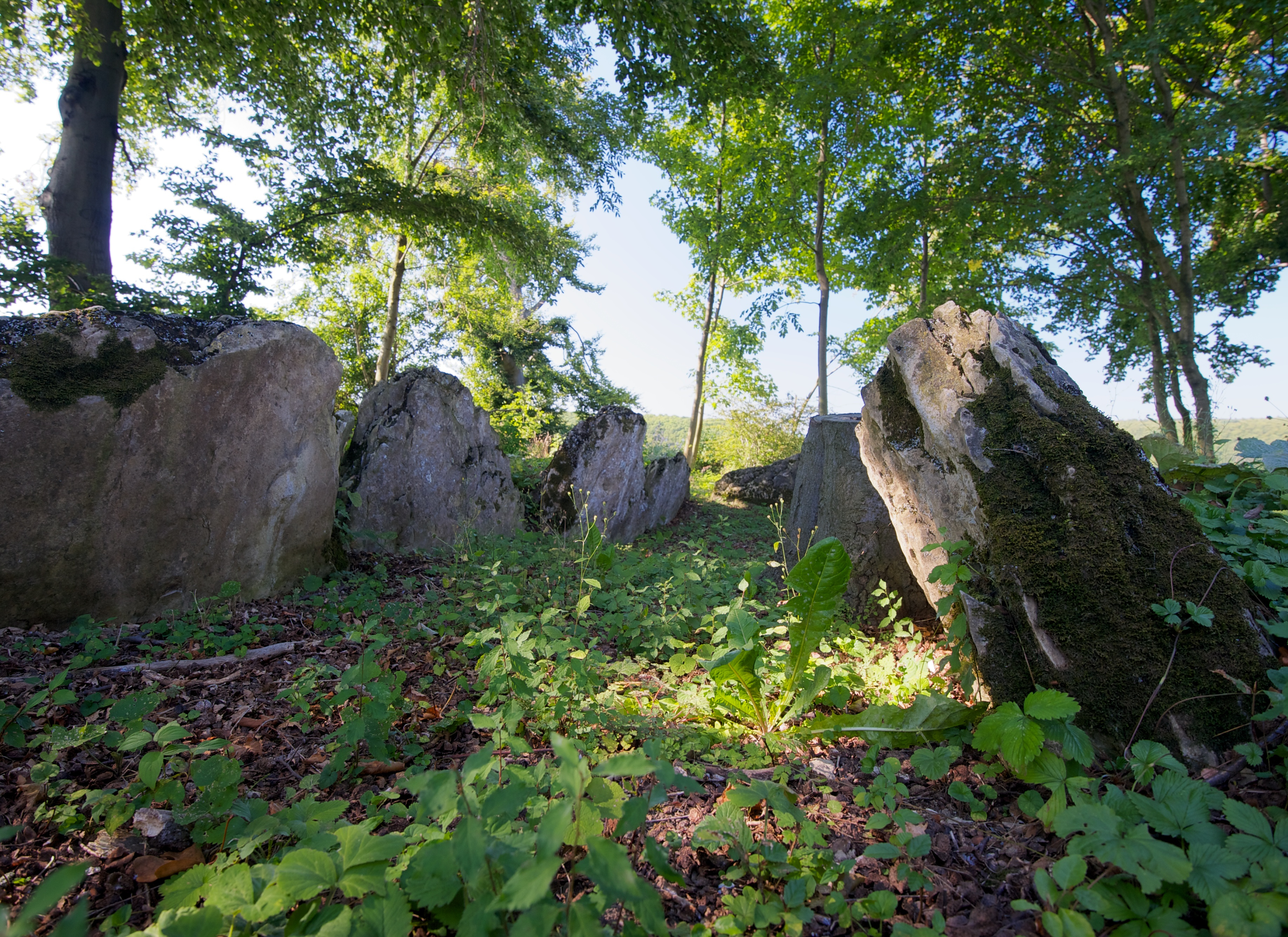 Steinkistengrab bei Gellinghausen (Borchen)